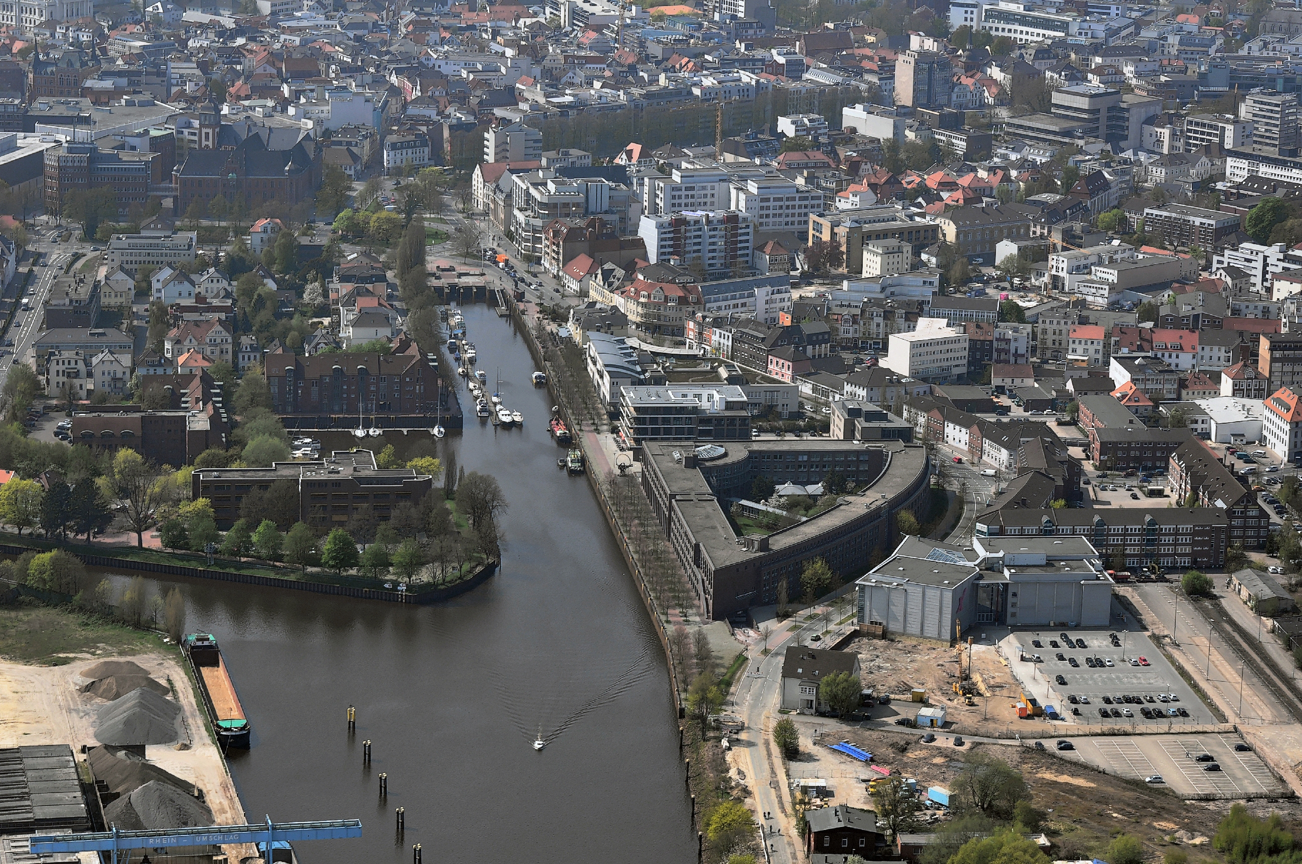 Luftbilder von der Nordseeküste 2013-05: Hafen Oldenburg